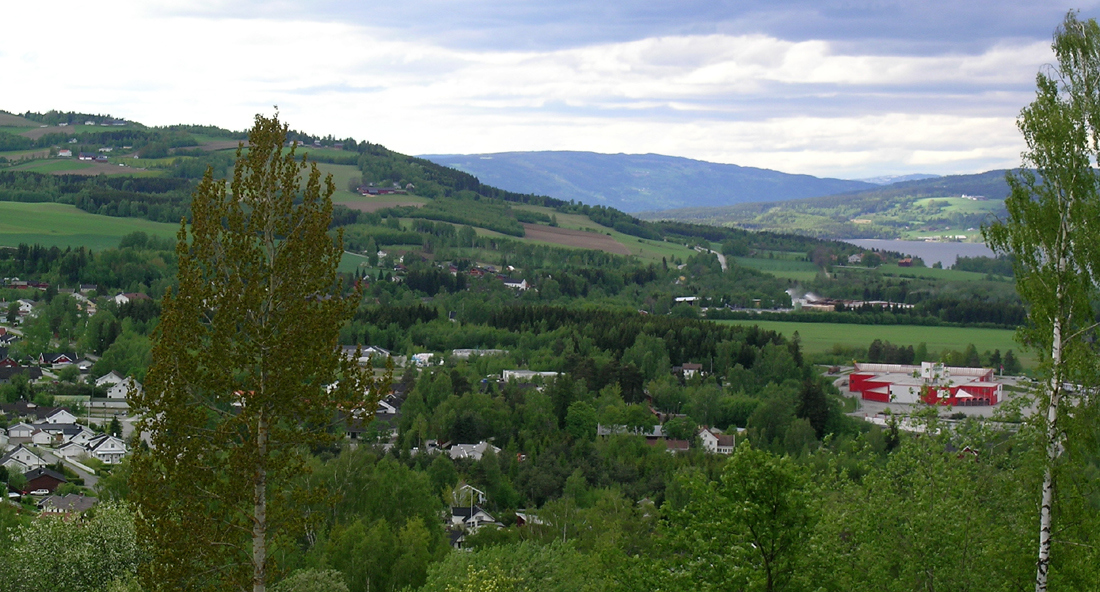 Biri sett mot nord. Tettstedet Biristrand i forgrunnen og Mjøsa i bakgrunnen til høyre.